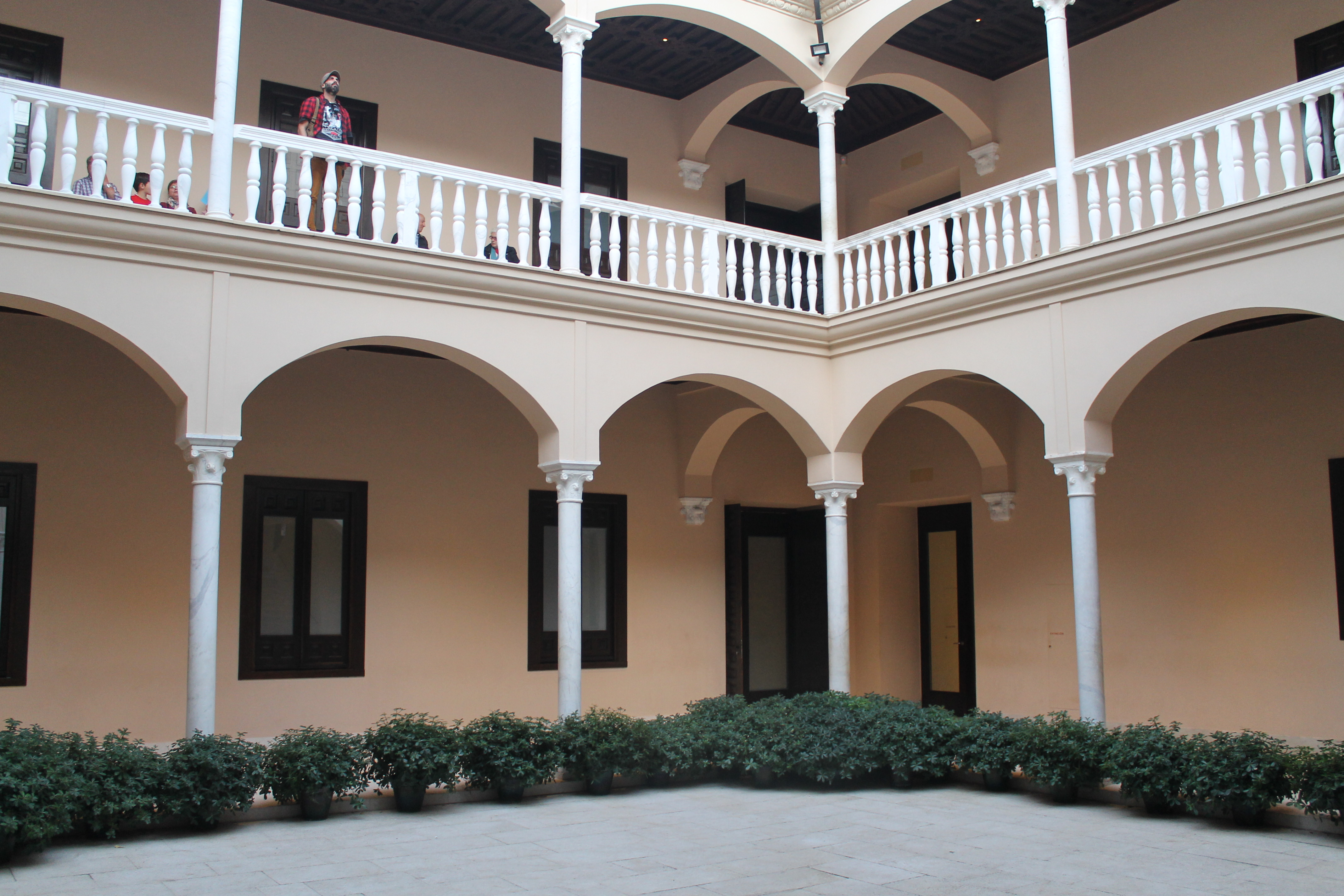 Patio principal del Museo Picasso Málaga. Imagen de enero de 2018.